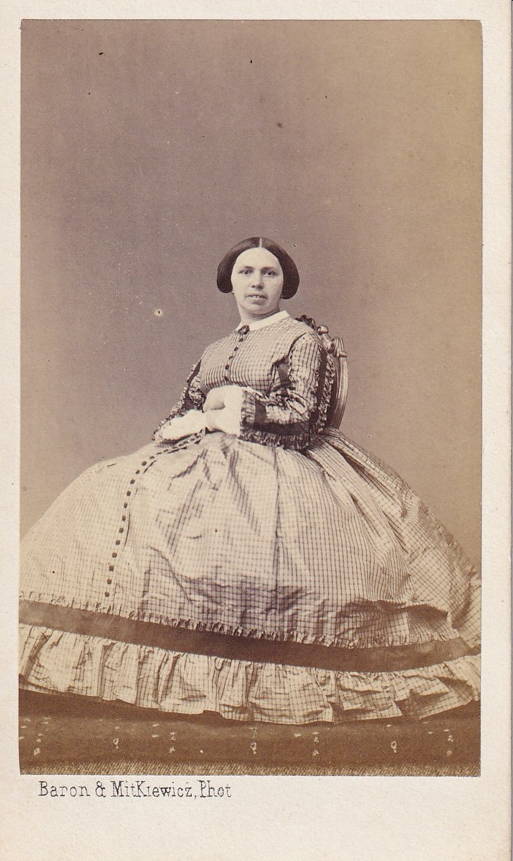 Antoinette Victoire Coniart épouse d'Auguste Van Dievoet